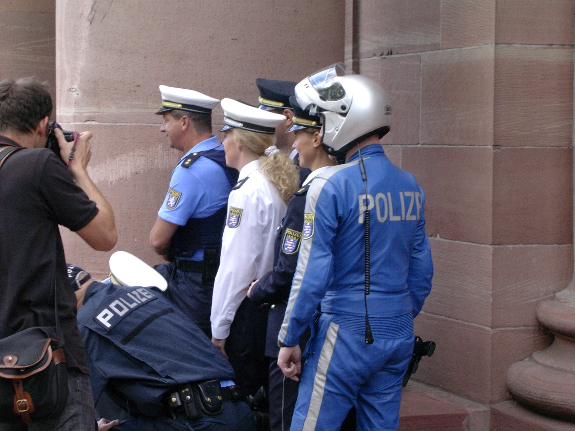 Neue blaue Uniform der Polizeien der Länder Hessen, Rheinland-Pfalz und Thüringen